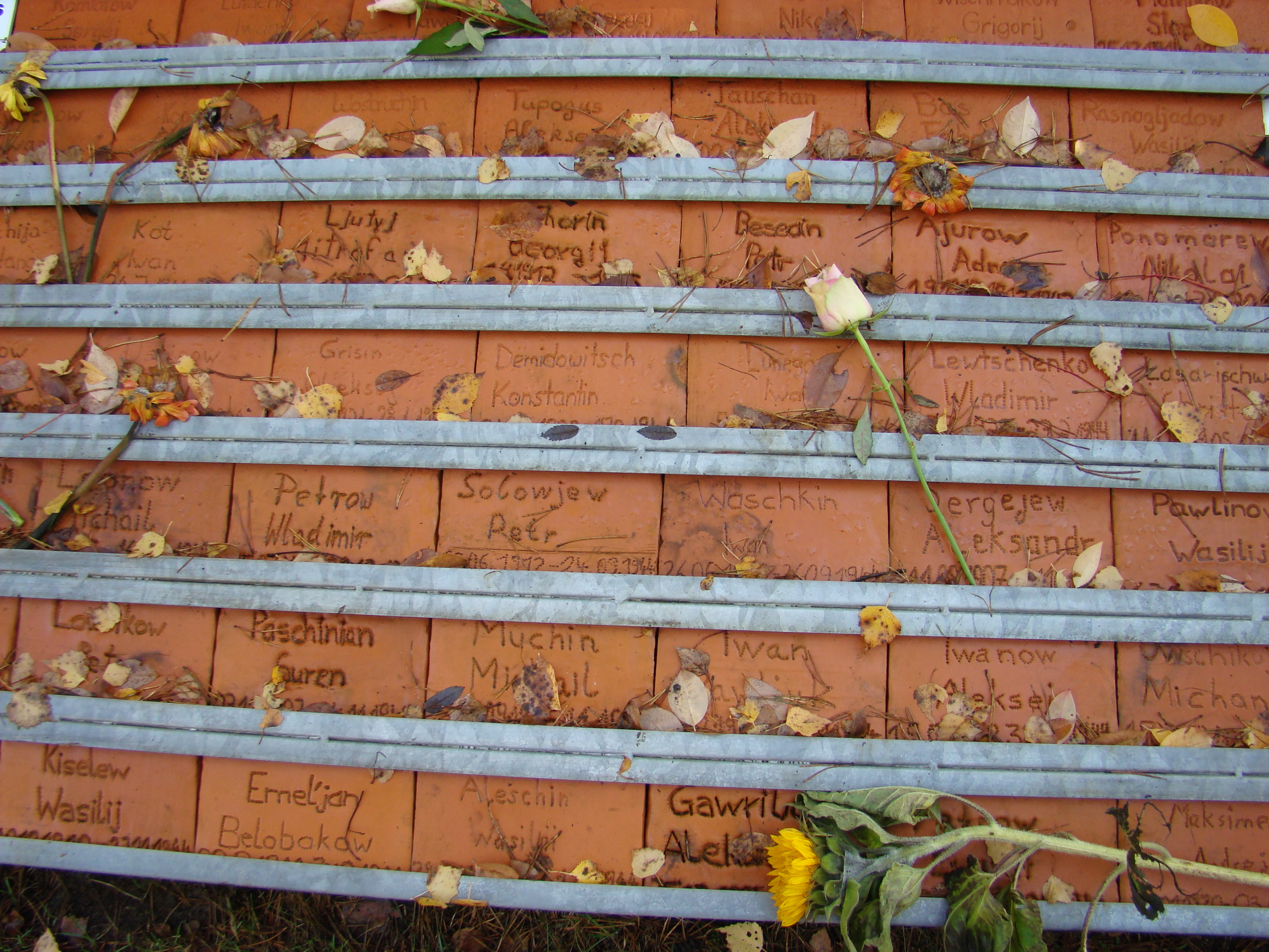 Sowjetischer Kriegsgefangenenfriedhof Bergen-Belsen, Kacheln mit Namen der Toten